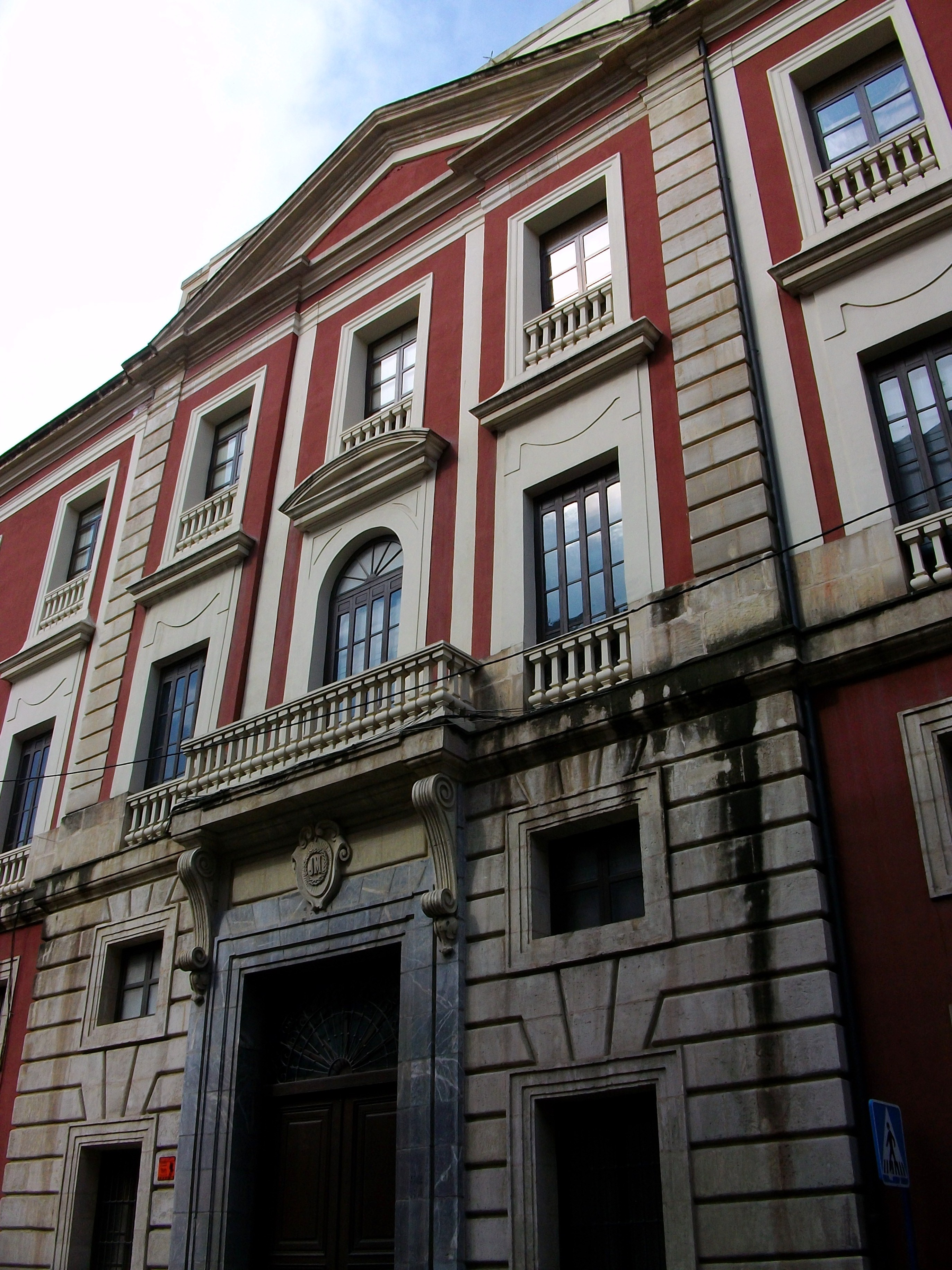 Façana del col·legi Jesus Maria San Agustín d'Oriola.